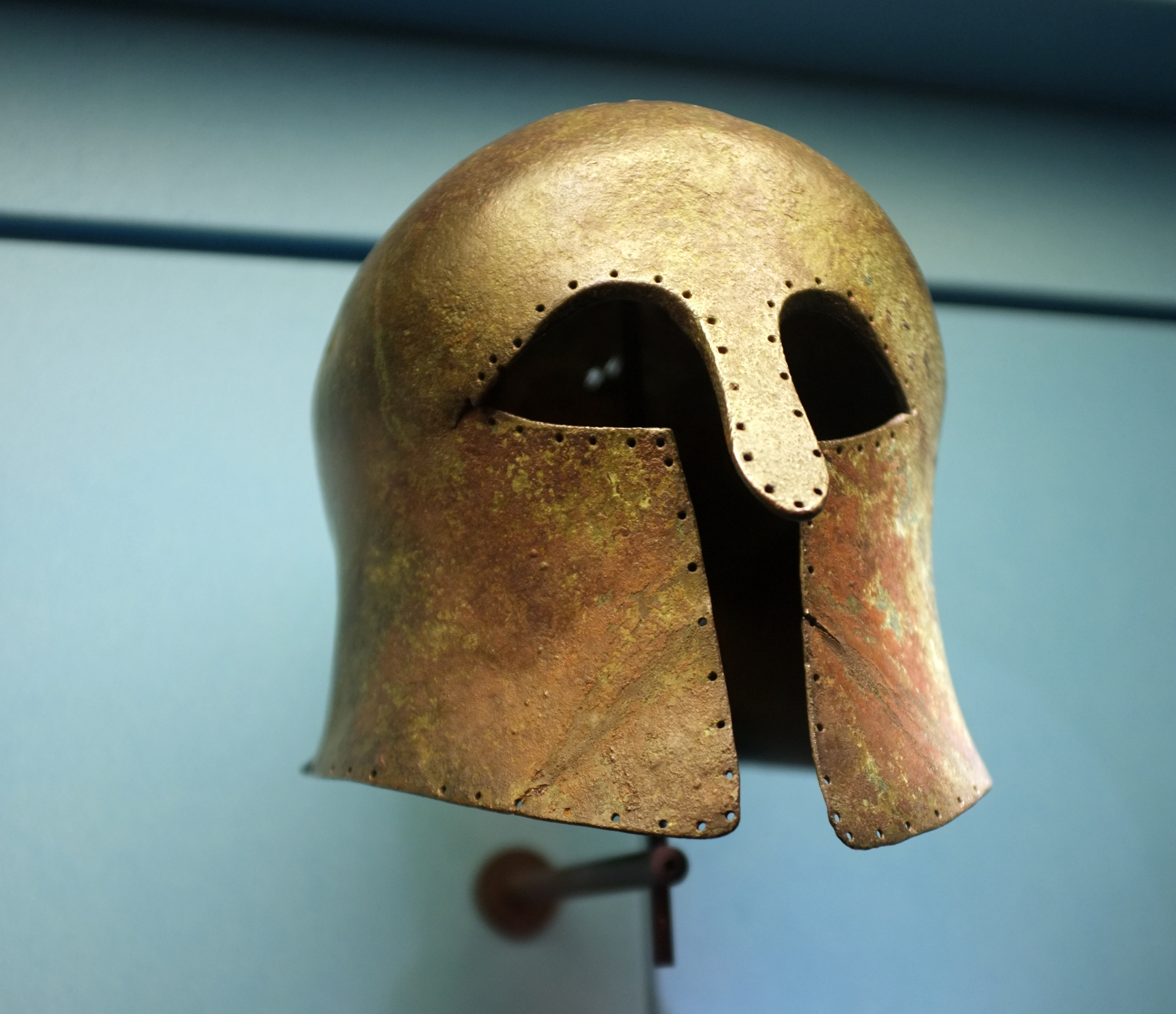 Spartan Helmet